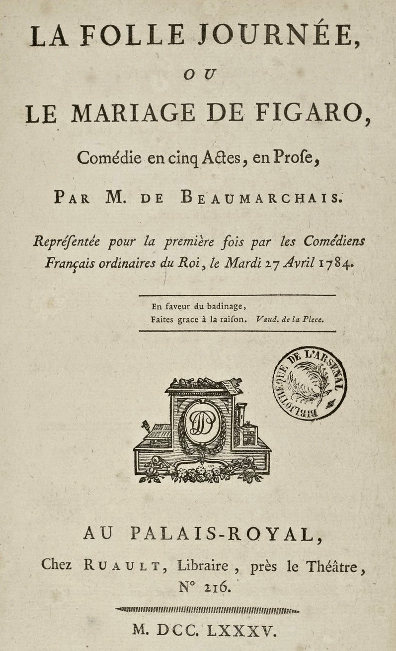 Pierre-Augustin Caron de Beaumarchais (1732–1799): "Le mariage de Figaro", Ruault, Paris 1785, Titel. Bibliothèque nationale de France.